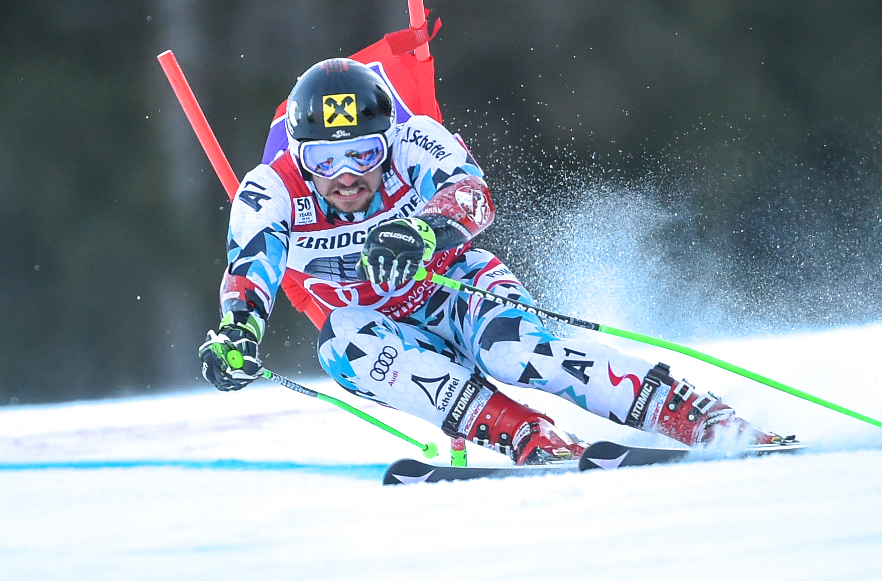 Kandahar Rennen 2017,Audi FIS ski world cup Garmisch-Partenkirchen,men,giant slalom,Kandahar,Marcel Hirscher